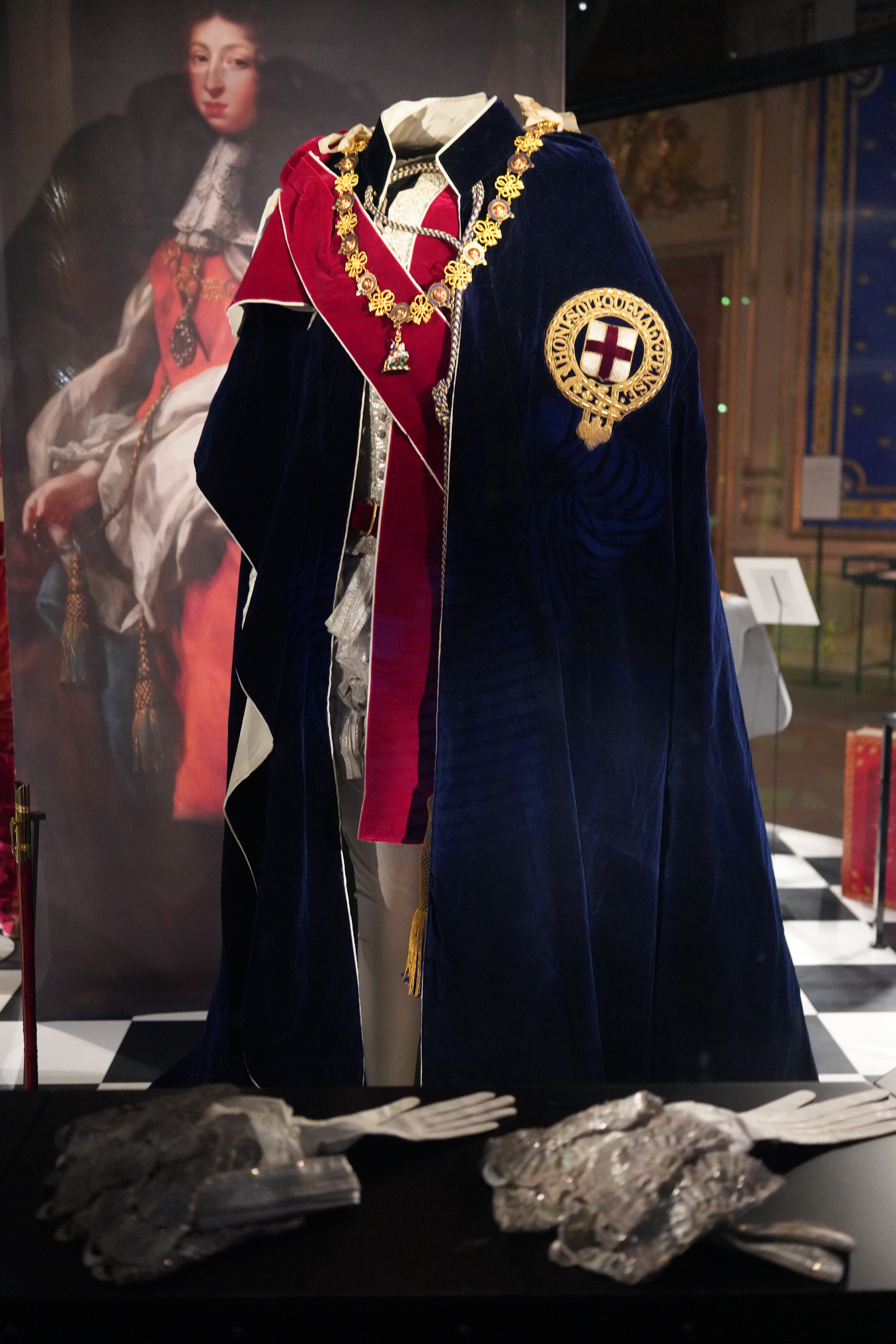 20180624_Slottet_7533